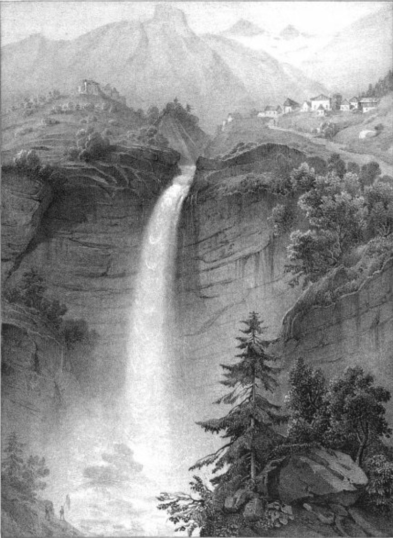 Album du Dauphiné - tome IV, litographie de la cascade du Périer, près de Valbonnais